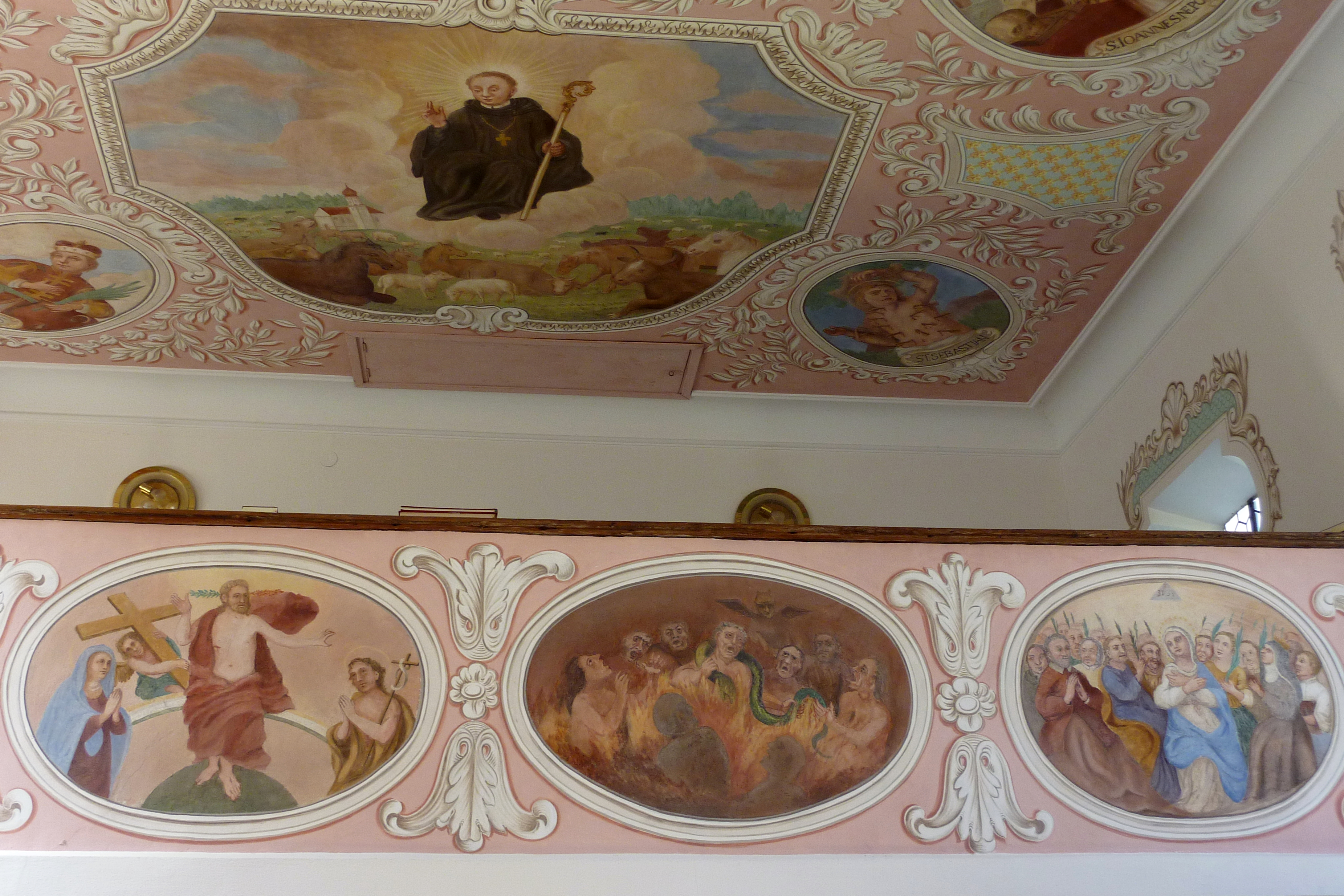 Katholische Filialkirche Hl. Dreifaltigkeit und St. Leonhard in Bocksberg, einem Ortsteil von Laugna im Landkreis Dillingen an der Donau (Bayern), Empore mit Darstellung der Auferstehung Christi, die Verdammten in der Hölle oder im Fegefeuer, Maria umgeben von Heiligen und Märtyrern; an der Decke die Aufnahme des hl. Leonhard in den Himmel